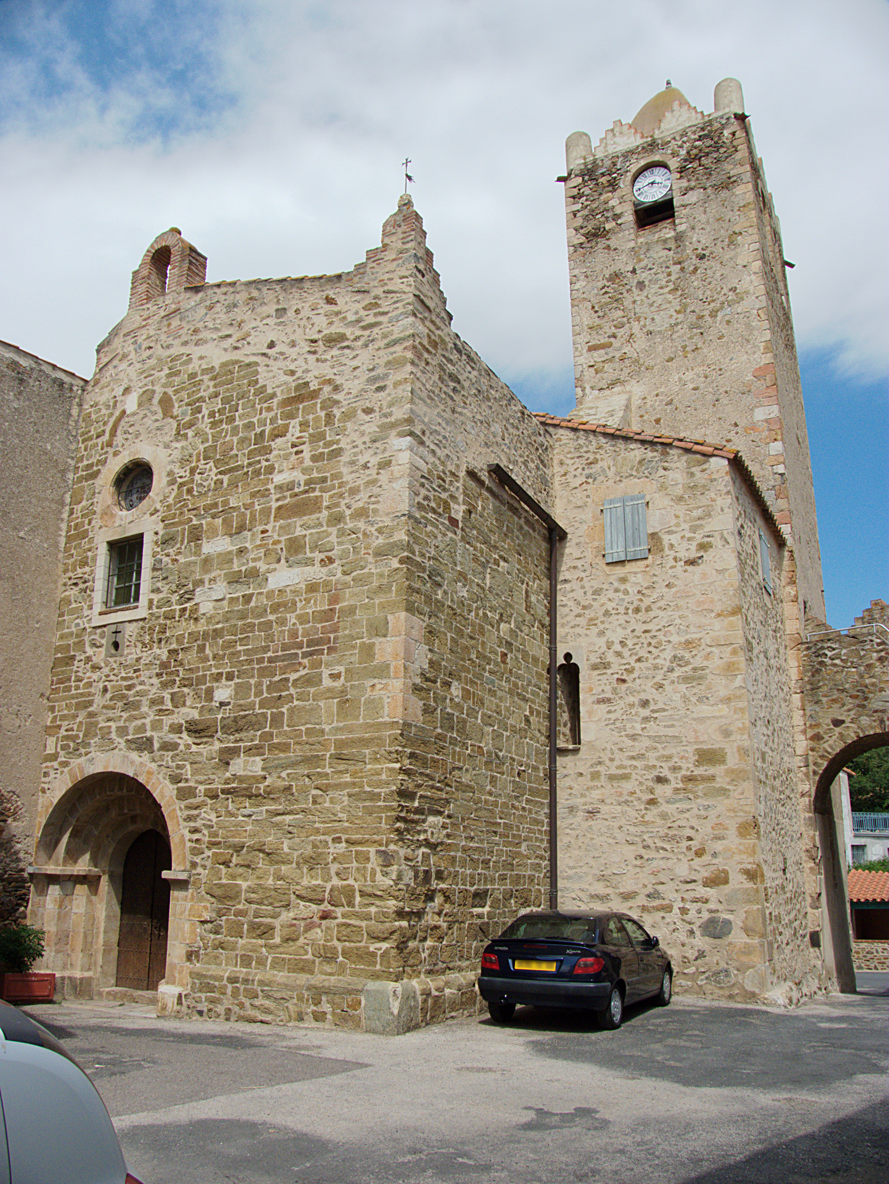 Église Saint-Jean, Oms (Pyrénées-Orientales, Languedoc-Roussillon, France)